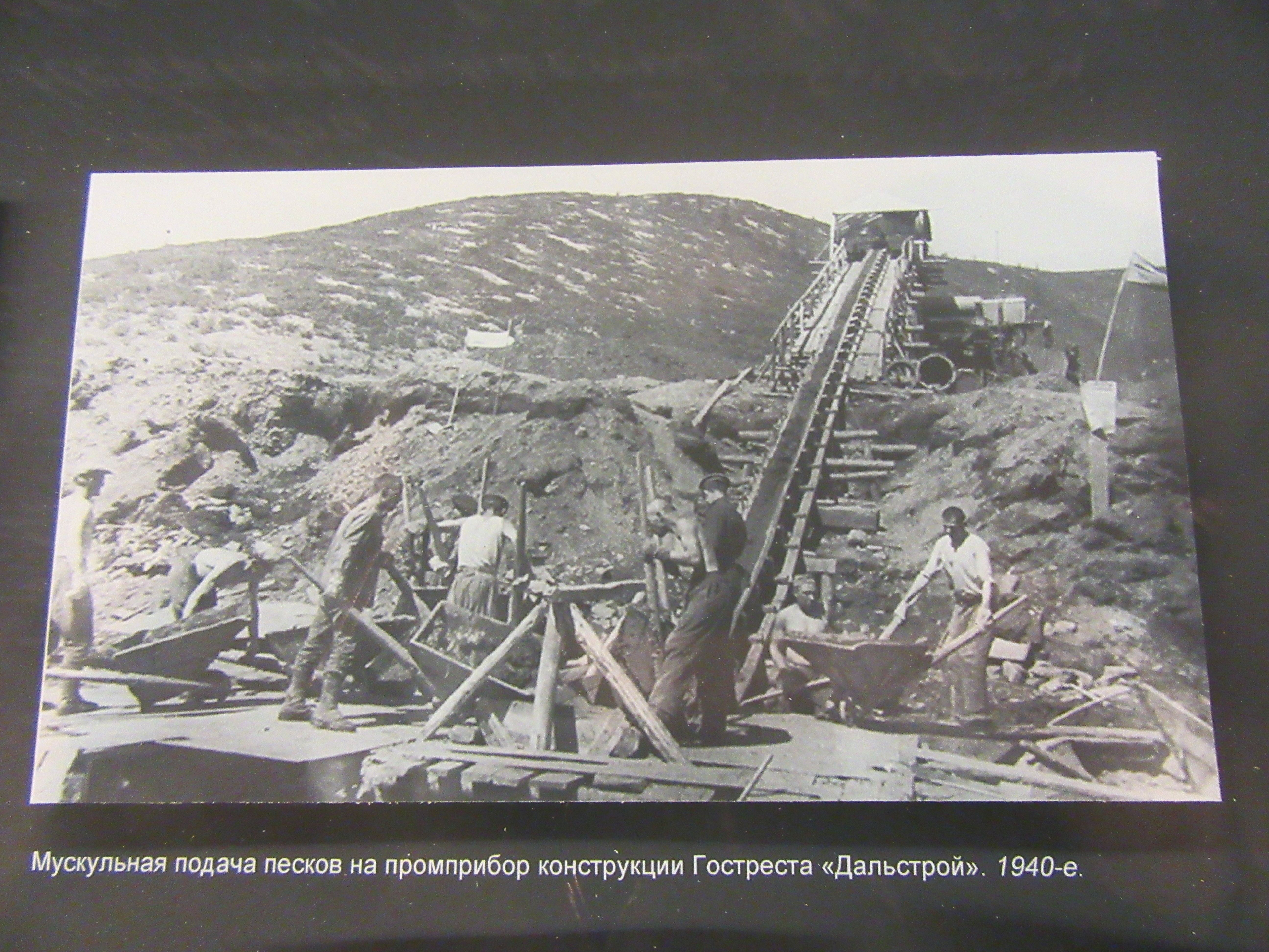 Prisonniers poussant des chariots au sommet d'un terril , photo du musée de Vologda